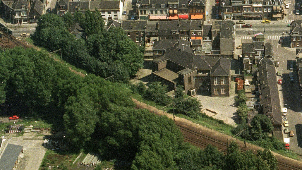 Luchtfoto van de 1e Daalsebuurt te Utrecht. Centraal in de driehoek die gevormd wordt door de spoorlijn Utrecht-Amersfoort, de Amsterdamsestraatweg (boven) en de Boorstraat (rechts), ligt de Koningin Emmaschool. Linksboven tussen de bomen is de voormalig opzichterswoning van de spoorwegen te zien, met daarnaast de hoofd der school woning van voornoemde school.